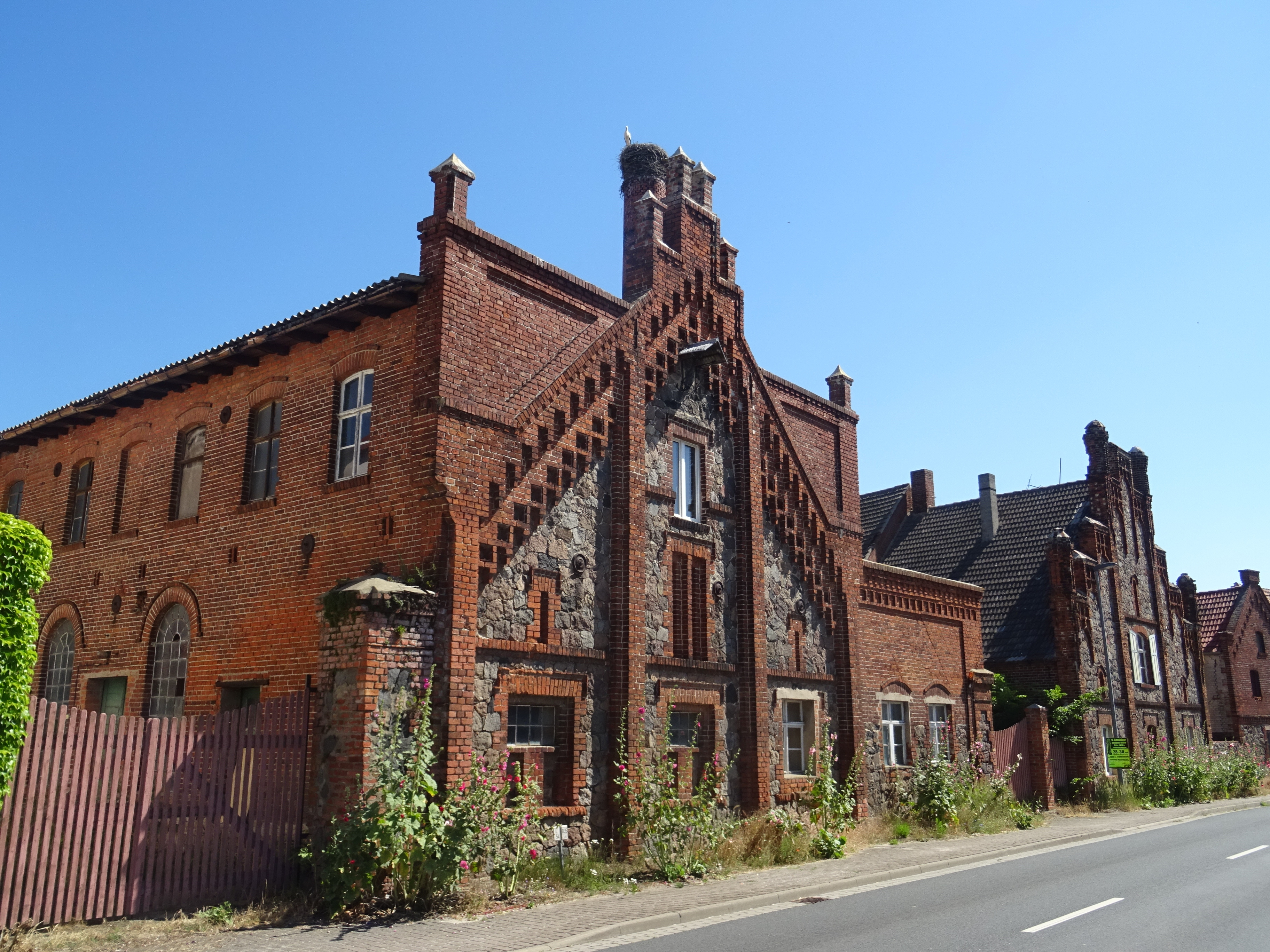 Dretzel, Ortsteil von Genthin. Denkmalgeschützte ehemalige Brennerei, Blick von Südwesten